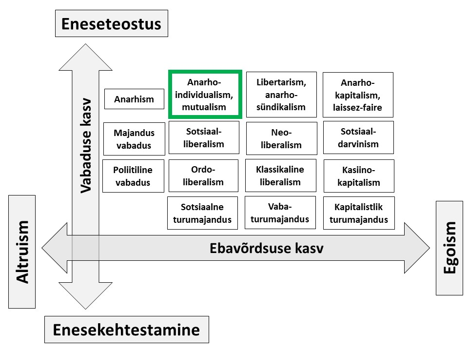 Anarhoindividualism sotsiaalse korra mudelis